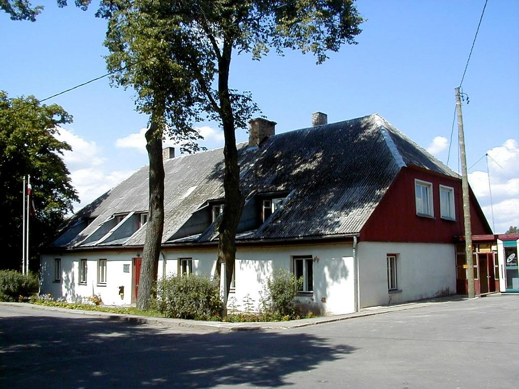 Platones pagastnams 2002-07-08